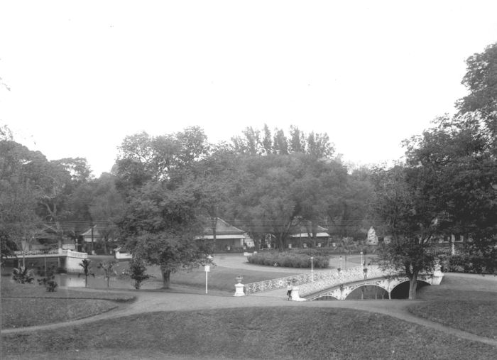 foto. Brug in het Wilhelminapark , Batavia